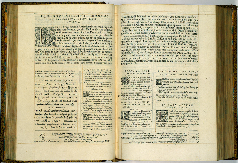 Антверпенская Полиглотта. Том. 5 pp. 232-233